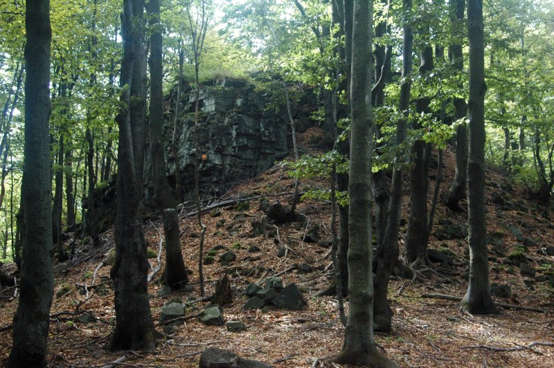 Vrchol Jarabej skaly